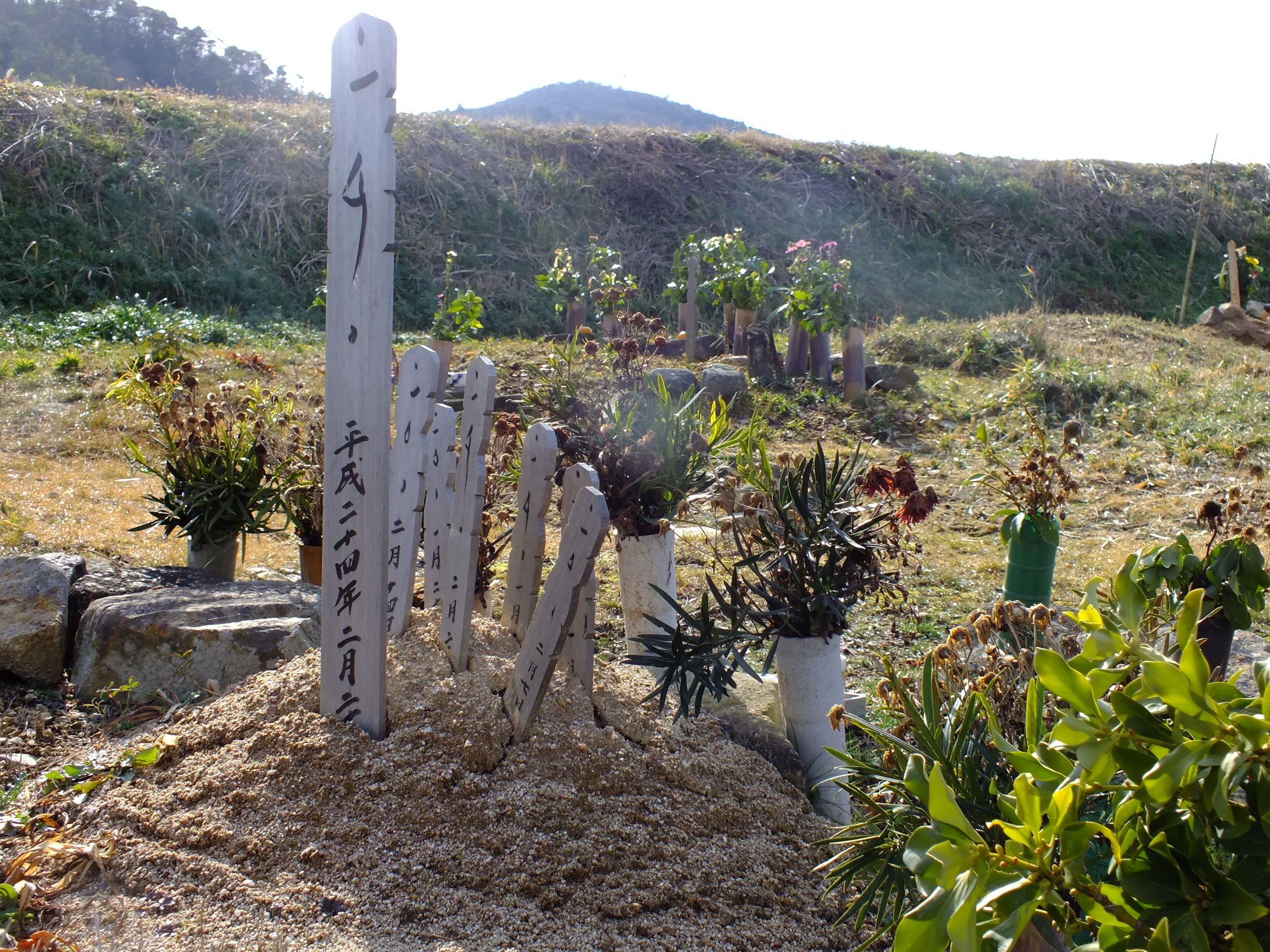 Wood stûpa Graves in Ogo,Kobe,Hyogo prefecture 神戸市北区淡河町の墓地と木製卒塔婆